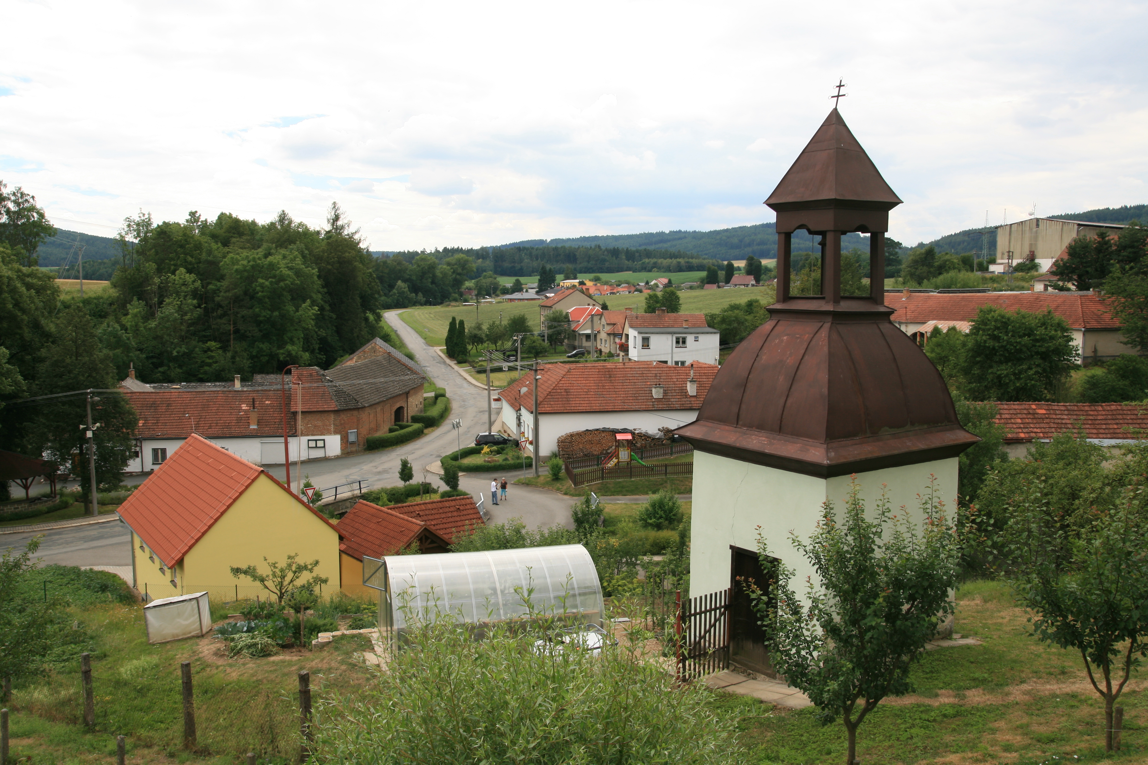 Vesnice Skočova Lhota, část obce Malá Roudka v okrese Blansko. Výhled z horní ulice od kaple na náves a dále k jihu na Malou Roudku.